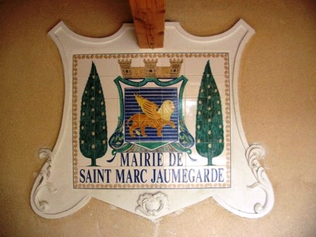 blason